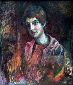 Porträt von Nina Kandinsky. Info: there is no proof that Wassily Kandinsky was the painter.